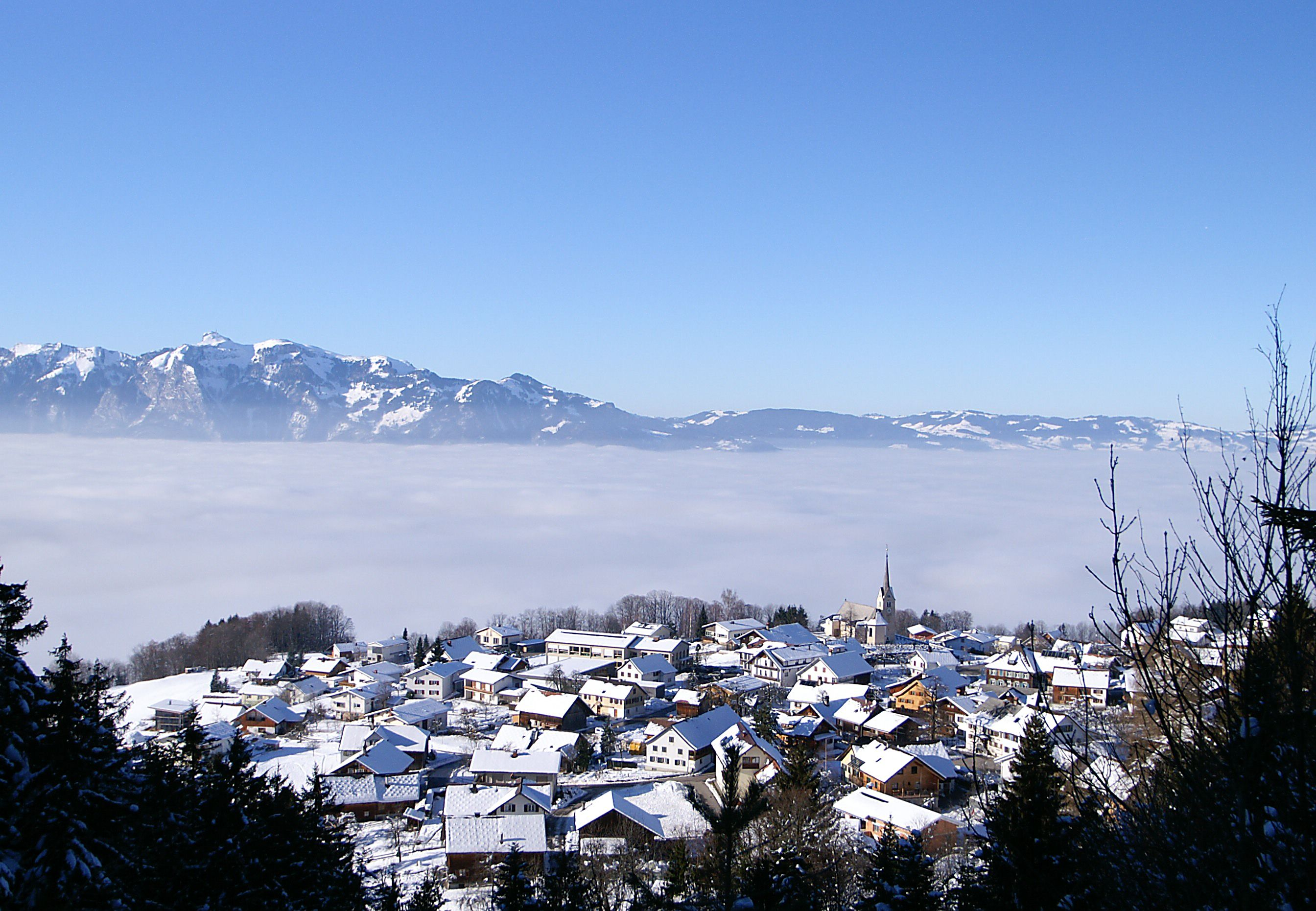 Blick von der L73 auf Übersaxen in Vorarlberg zu den schweizer Bergen des Alpsteins. Im Rheintal dichter Nebel.